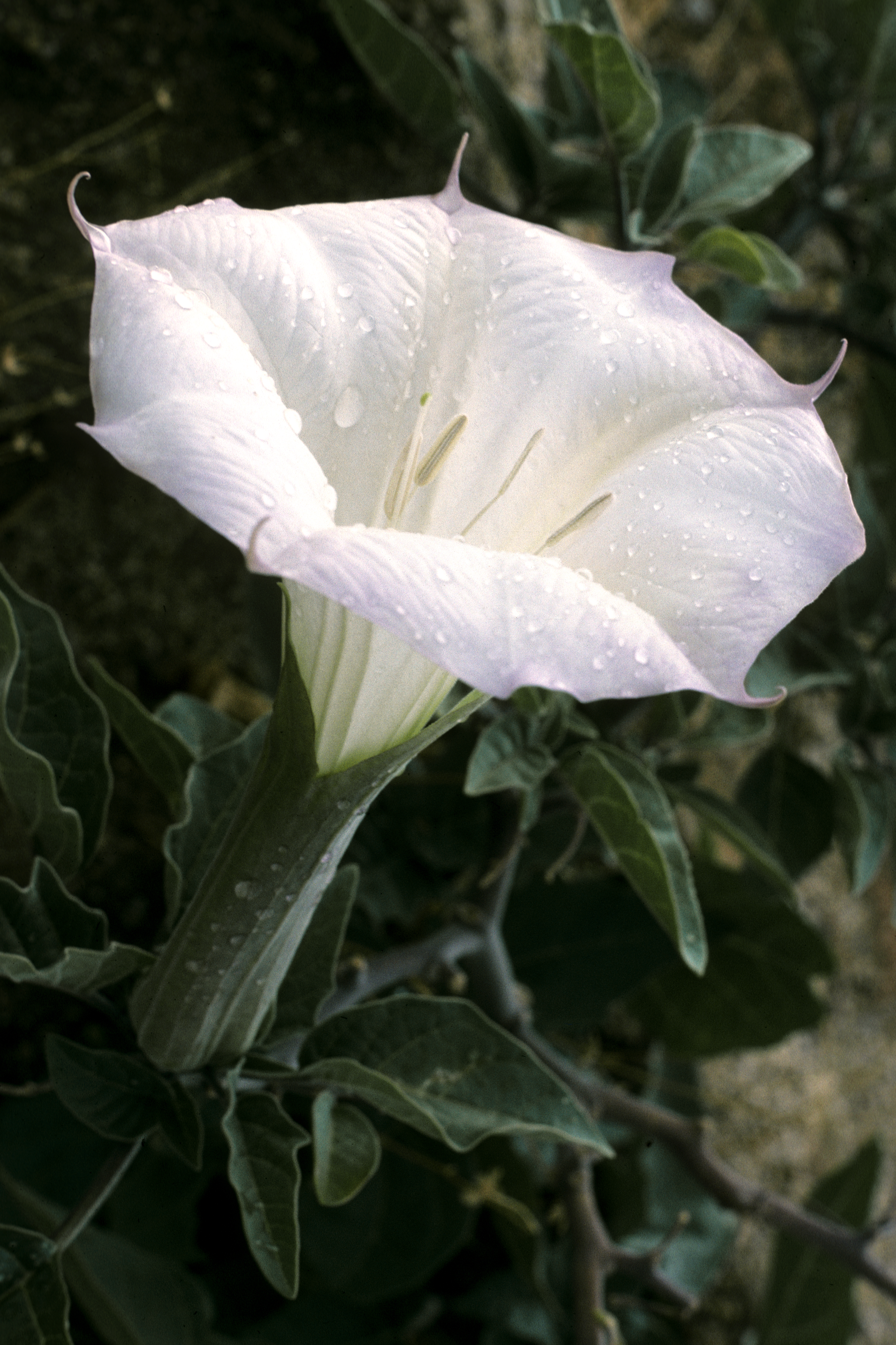 Sacred datura (Datura wrightii)